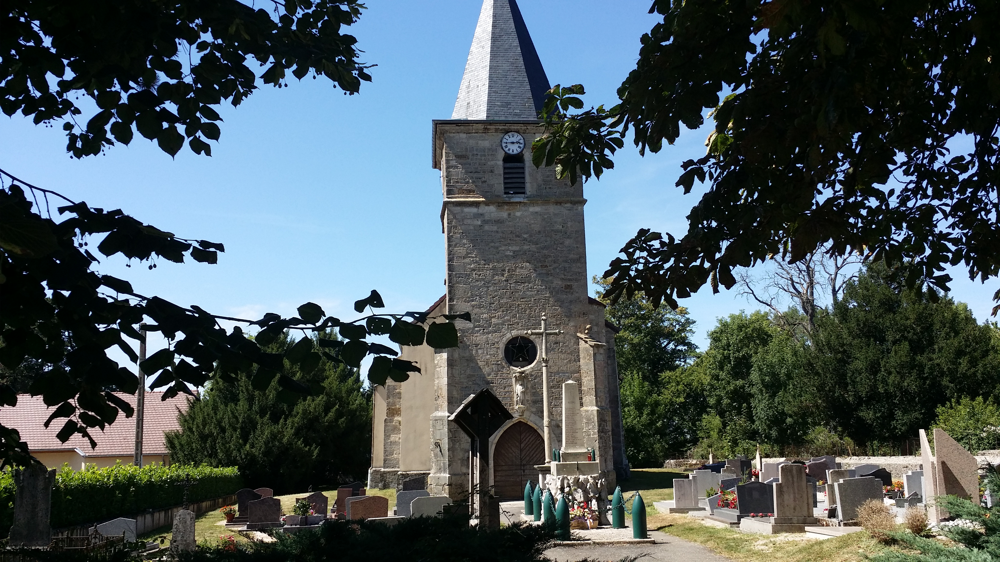 L'église à Miéry.